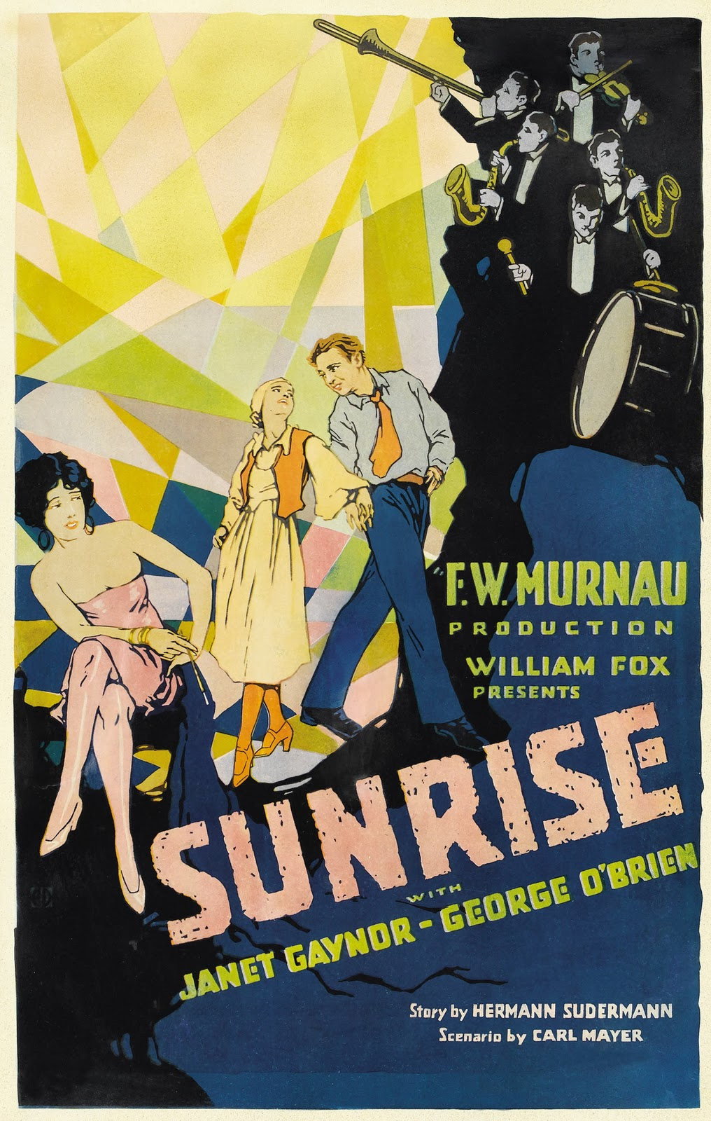 Locandina per il film di Friedrich Wilhelm Murnau "Aurora" 1927.